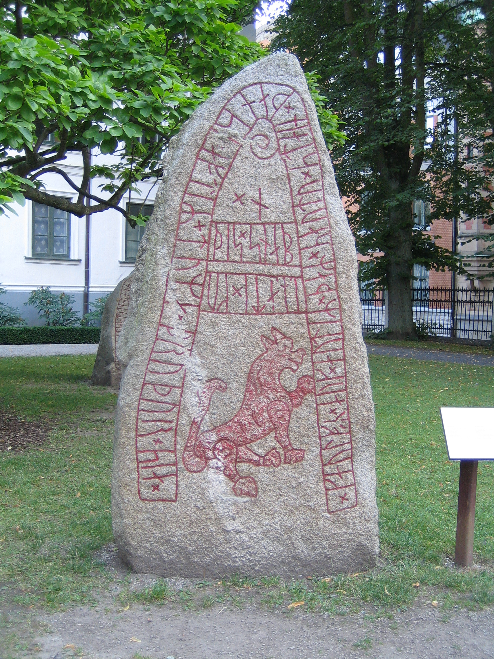 Gussnavastenen, Kulturen i Lund, signum DR 280.